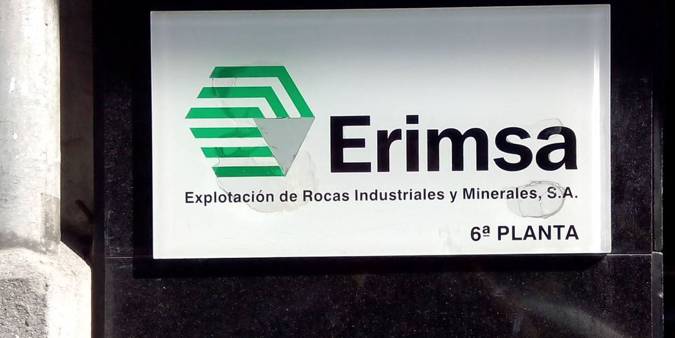 Oficinas de Erimsa na rúa Juana de Vega, A Coruña.